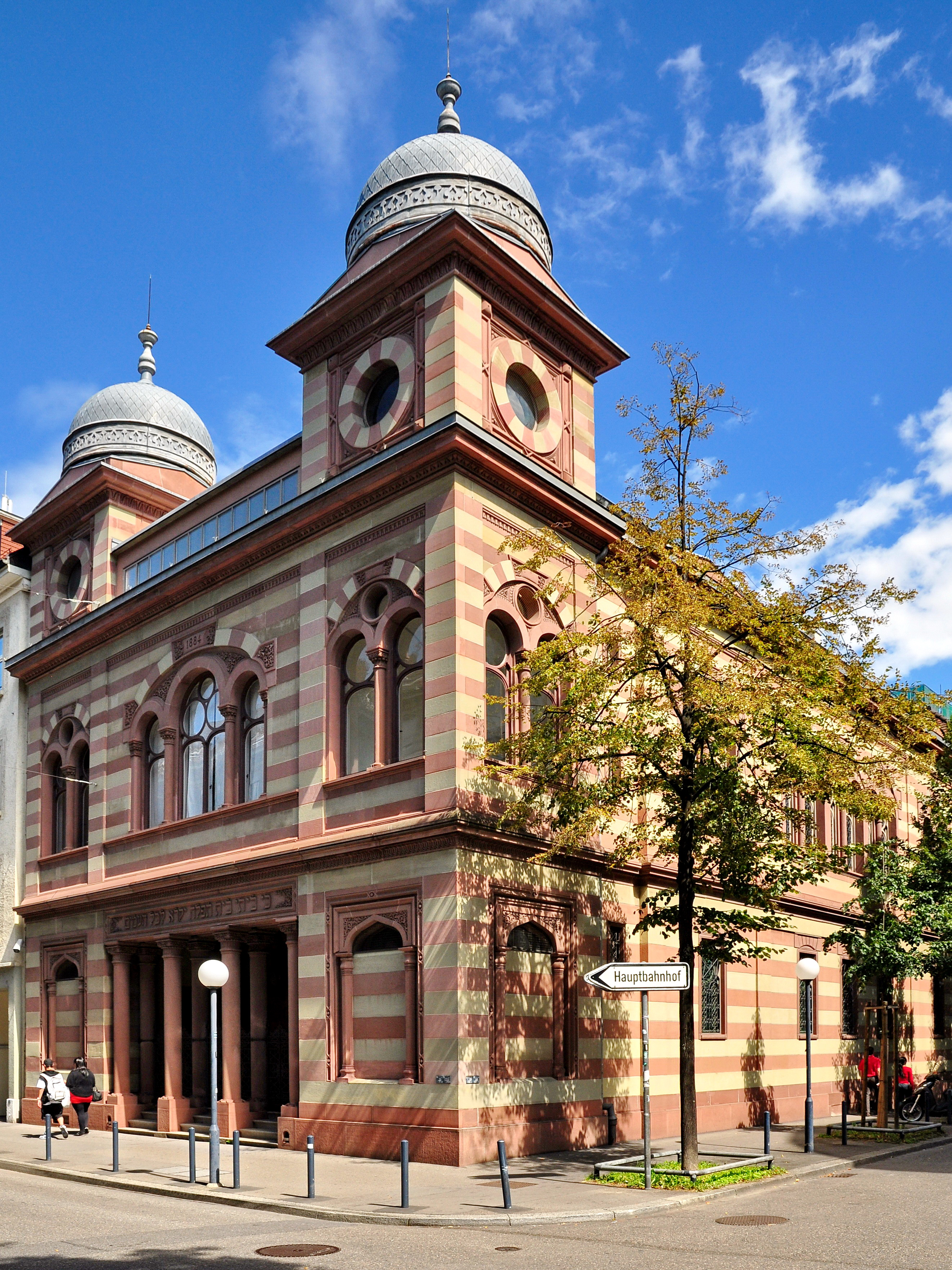 Synagoge der Israelischen Cultusgemeinde, Löwenstrasse in Zürich-City (Switzerland)